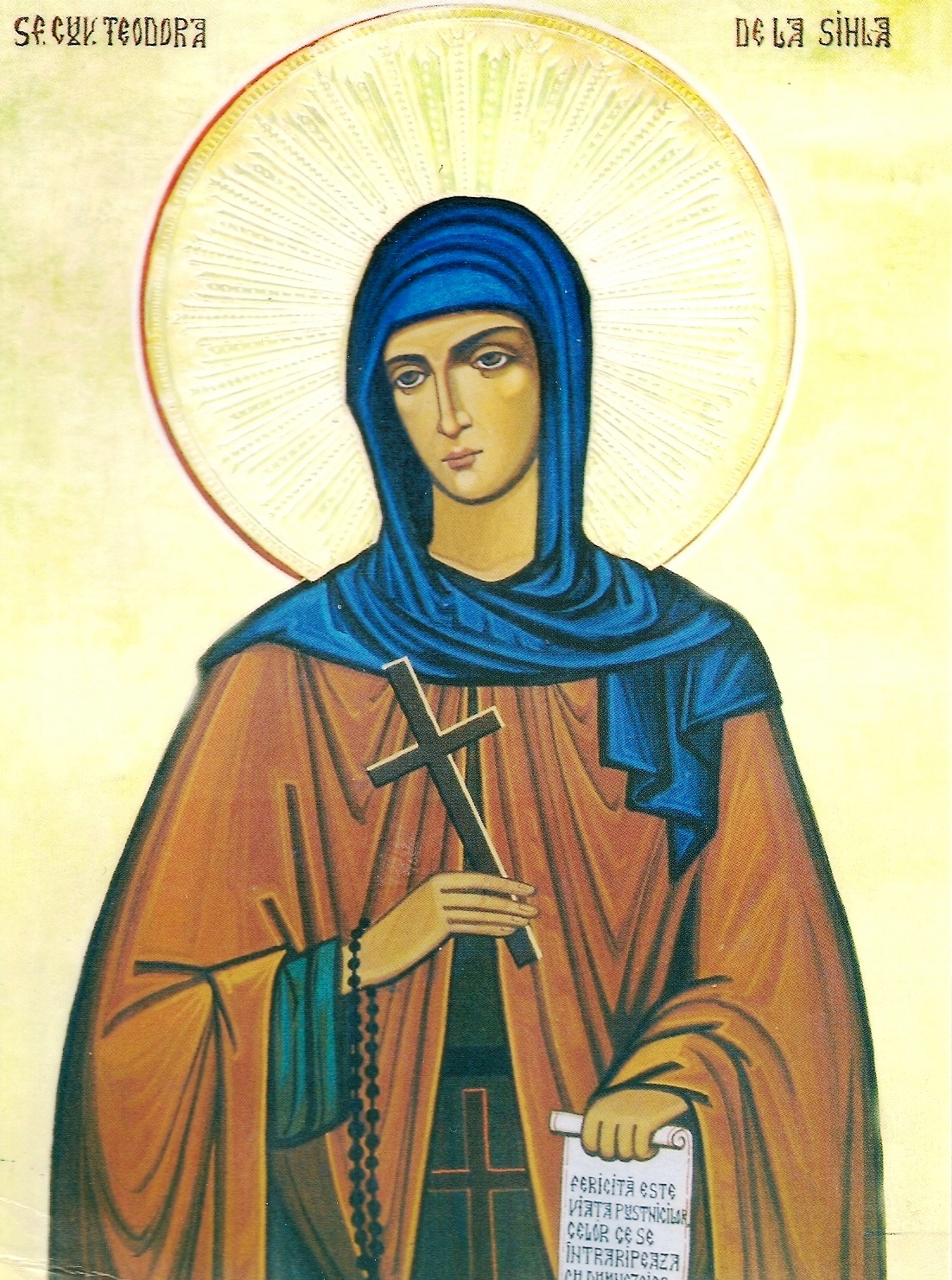 Popular ícono de Santa Teodora de Sihla